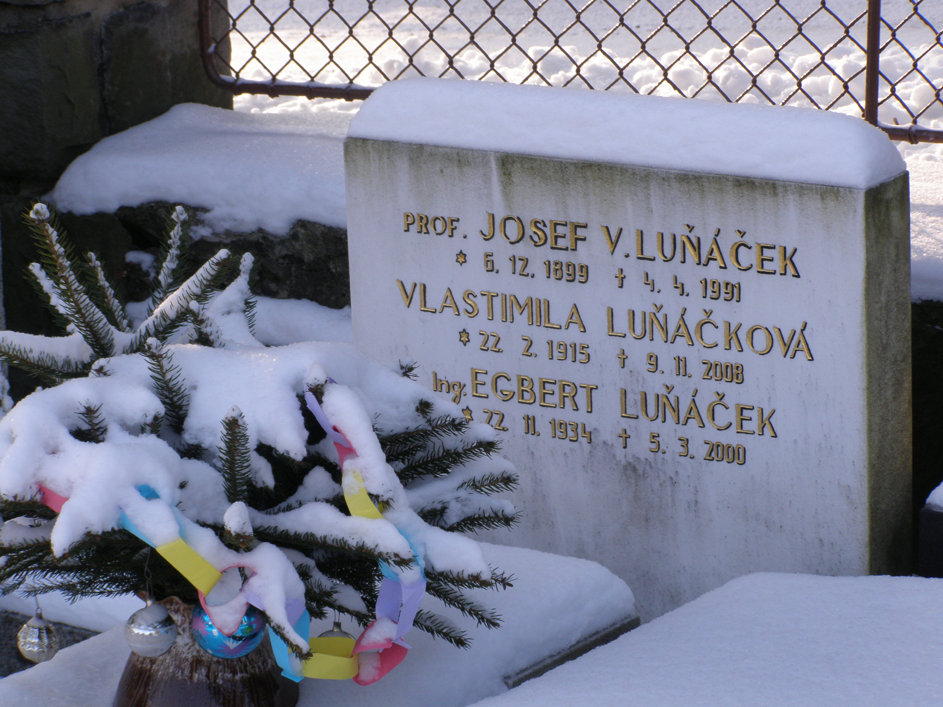 Metylovice, současný hřbitov, hrob rodiny středoškolského profesora a malíře Josefa Luňáčka